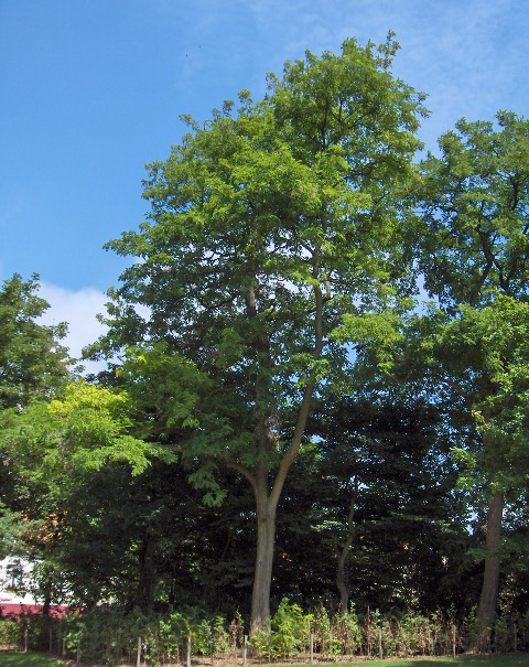 Species Robinia pseudacacia Family Fabaceae